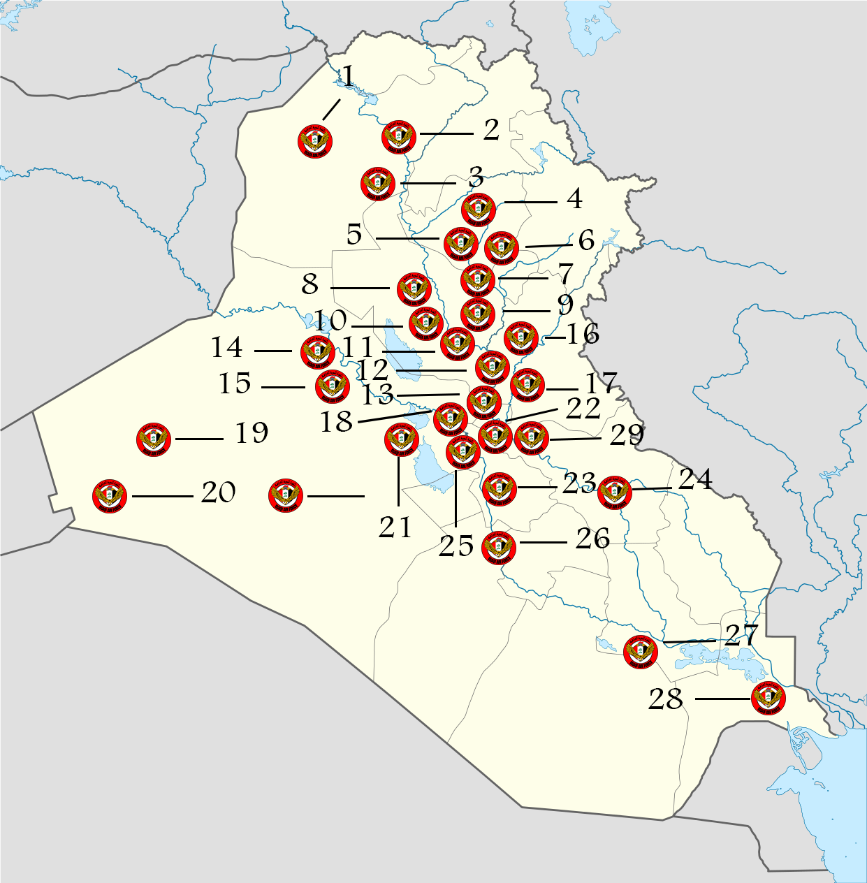 خريطة المطارات في العراق